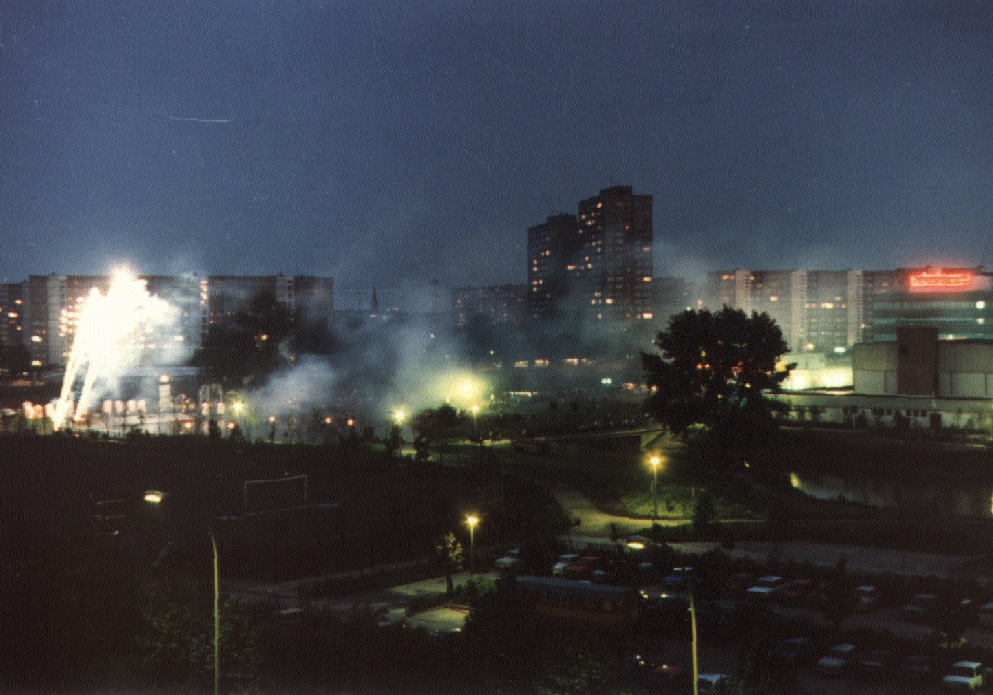 Fennpfuhlpark im Sommer 1988 beim "Drushbafest"